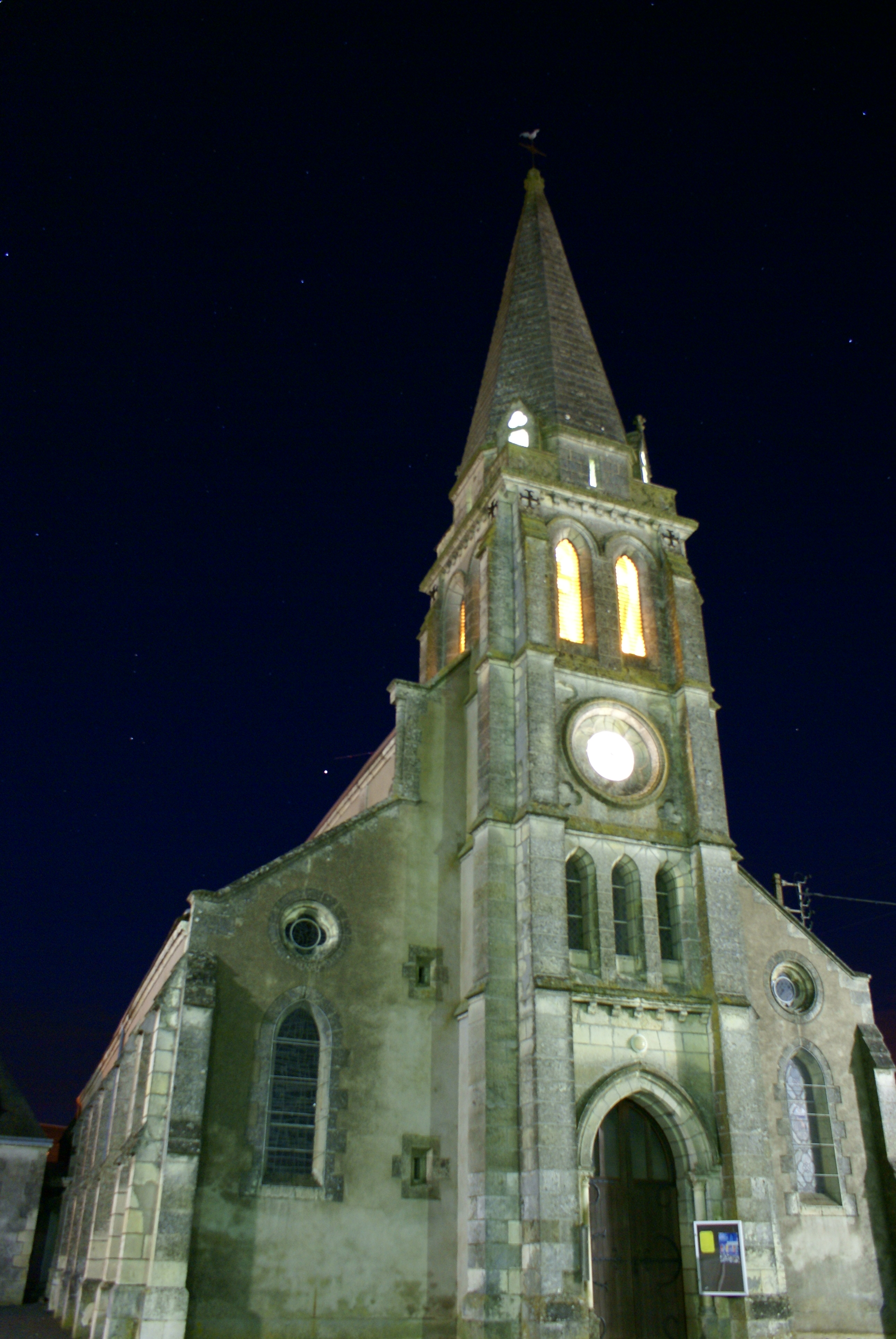 Saint-Amand-Longpré (Loir-et-Cher, France) - Église Saint-Amand.